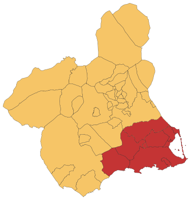 Localización aproximada del Campo de Cartagena en la Región de Murcia.